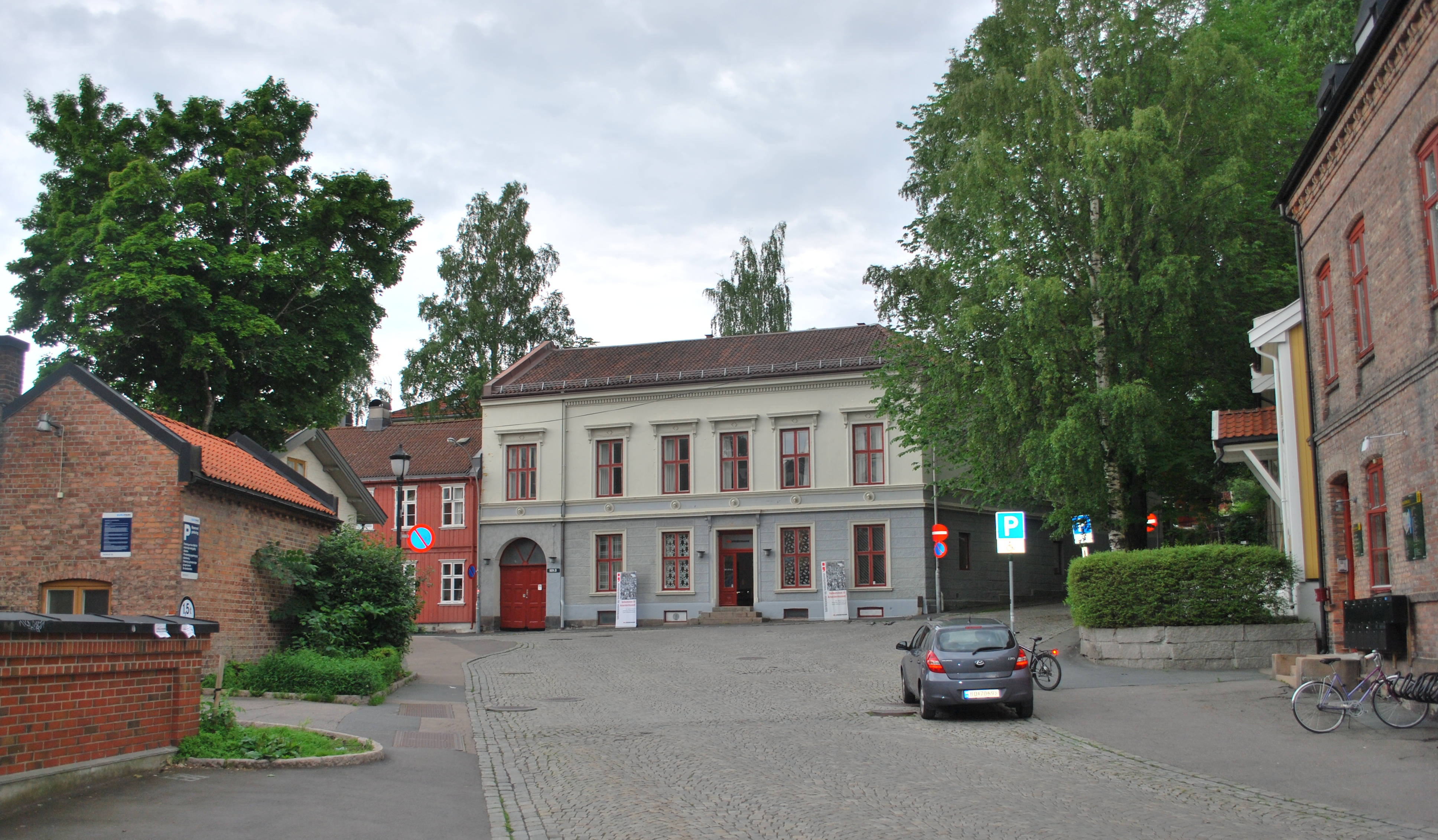 The industry and working class museum, dept. of Oslo Museum, located at Sagveien 28, Sagene, Oslo Arbeidermuseet, avdeling av Oslo Museum, åpnet 17. juni 2013 i Apotekergården, Sagveien 28 på Sagene. Graahs spinneri se til høyre, noe av Hjula veveri til venstre